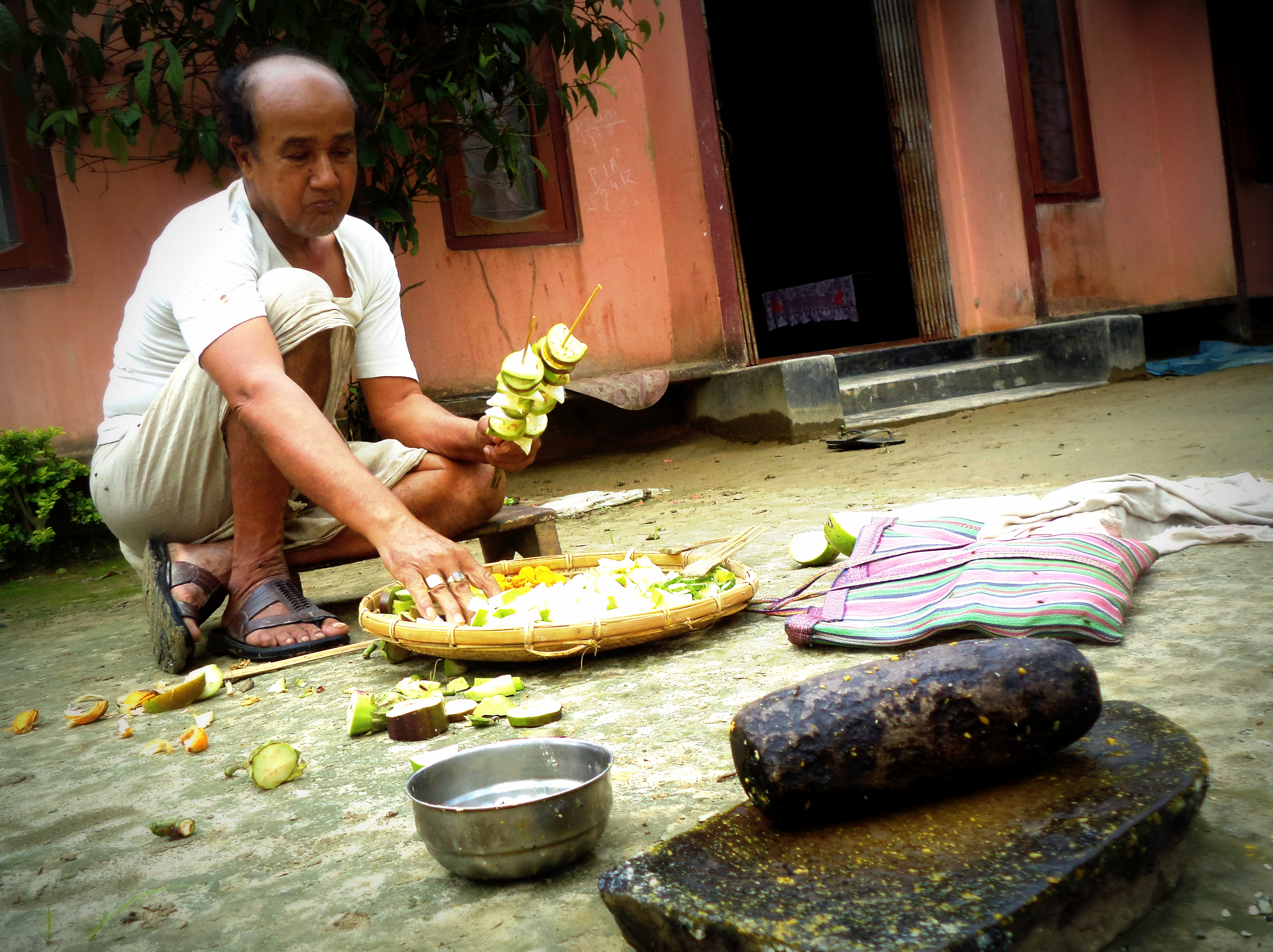 অসমীয়া: গৰু বিহুৰ দিনা গৰুৰ গাত মাৰিবলৈ চাট সাজিছে..